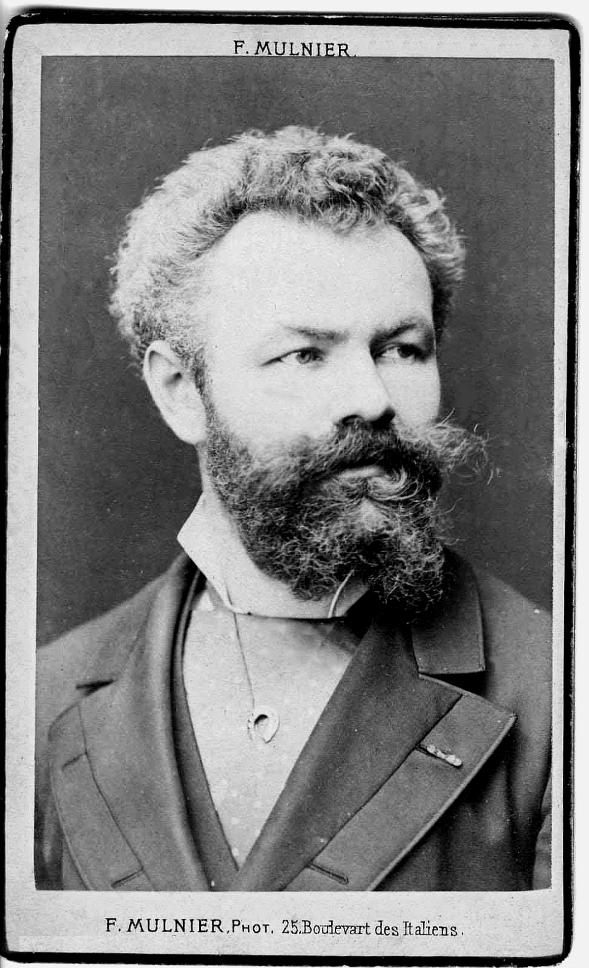 Munkácsi Munkácsy Mihály született: Lieb Mihály Leó németül Michael von Munkácsy, frankofón nyelvterületen Michel Léo de Munkacsy (Munkács, 1844. február 20. – Endenich, Németország, 1900. május 1.) magyar festőművész, a 19. század magyar festészetének nemzetközileg is elismert mestere.